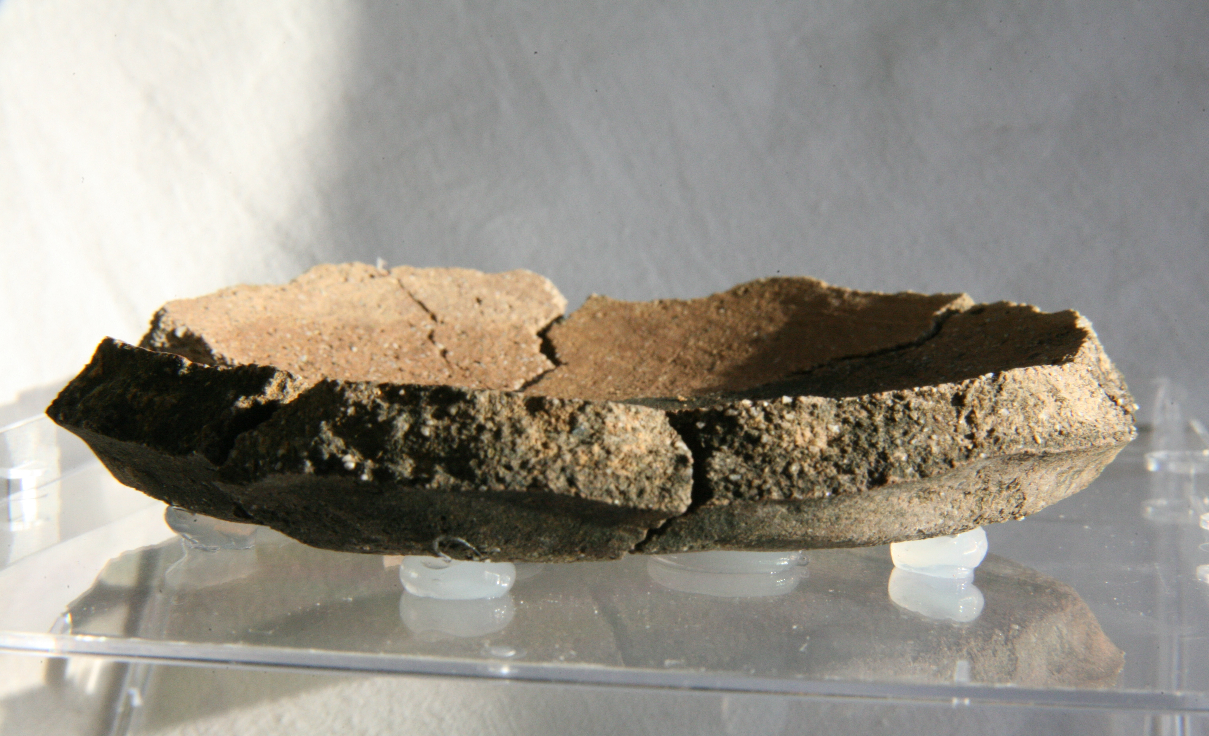 Restos de una vasija encontrado por RACF en el conchero denominado Campeche, en la ciudad de Cumaná (posiblemente de origen chaima)